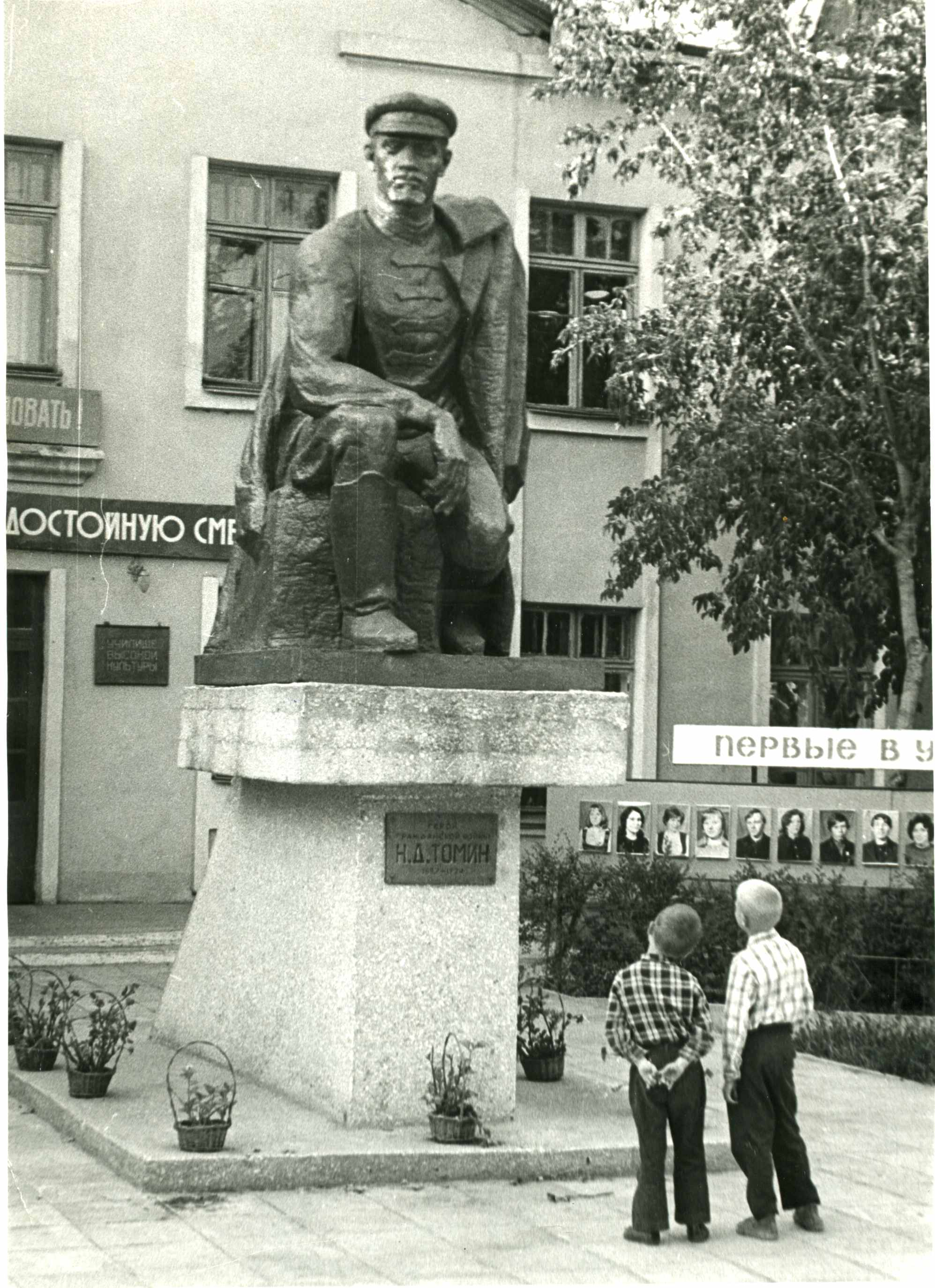 Памятник советскому военачальнику, участнику Гражданской войны.